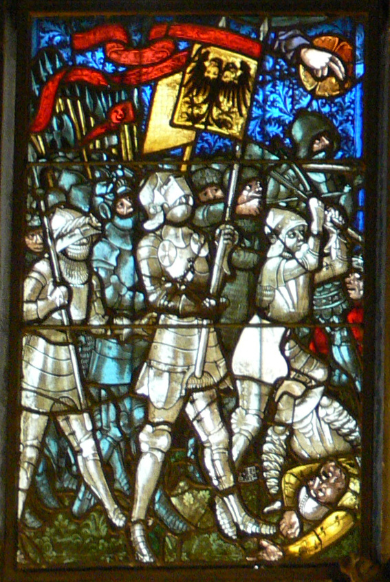 Berner Münster Passionsfenster, Ritter